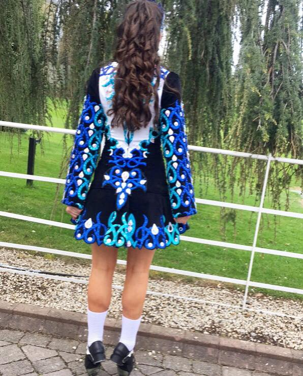 Gúna Damhsa